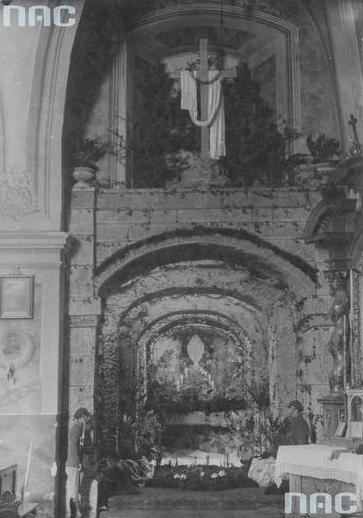 Lewa nawa w kościele franciszkanów w Sanoku. Grób Pański wykonany przez Maksymiliana Słuszkiewicza na święta Wielkiej Nocy. Fotografia z lat 1918-1939